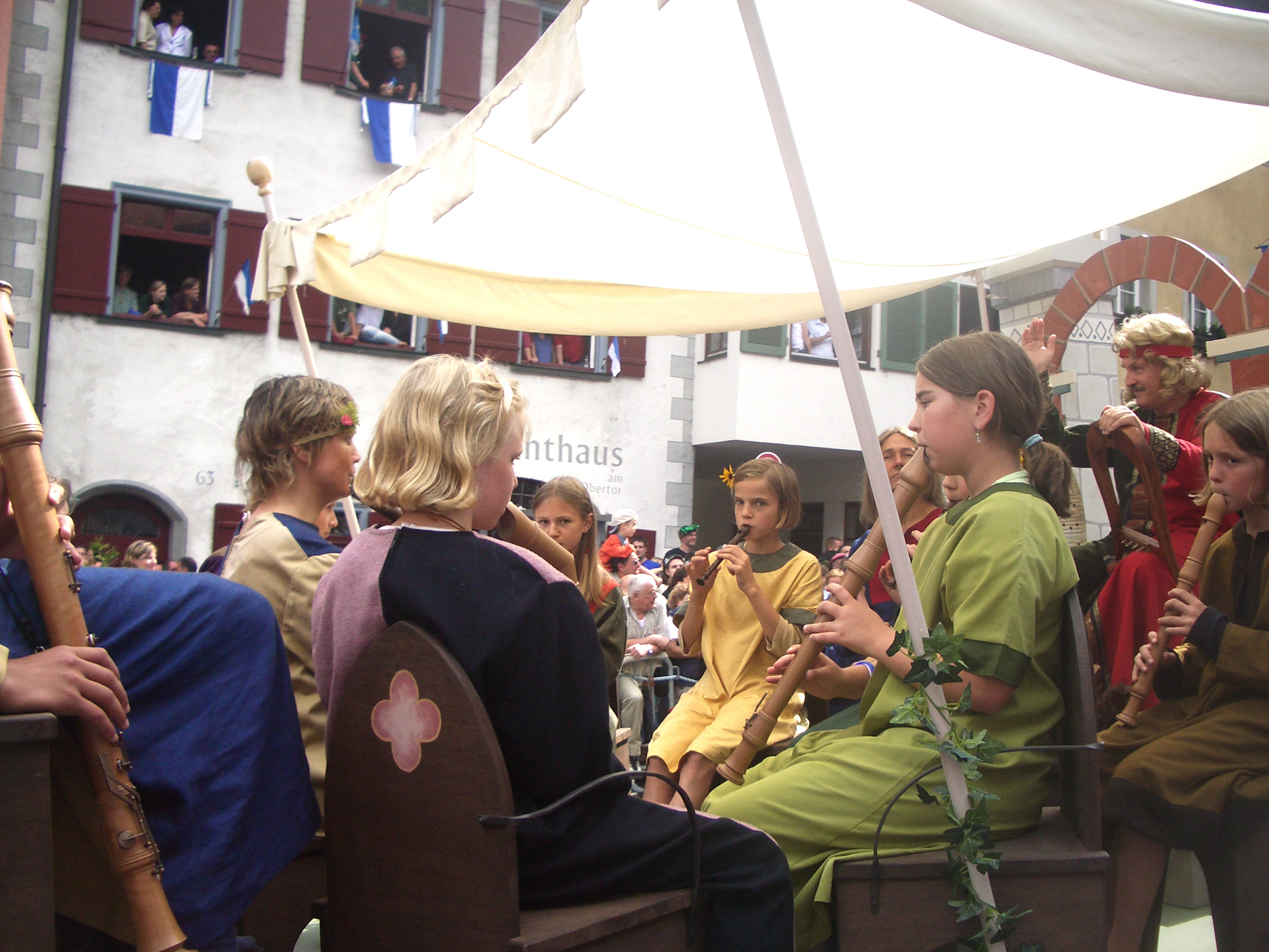 Ravensburg, Germany: Rutenfest, Festzug am Rutenmontag, Festzugsgruppe "Ulrich von Winterstetten"